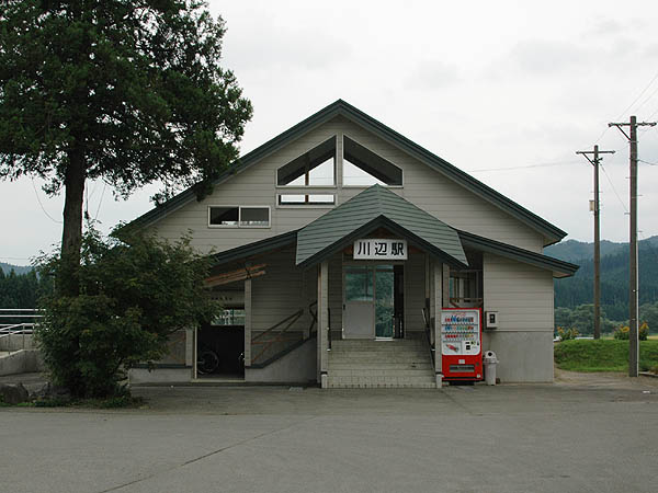 Kawabe Station, on Yuri Kōgen Railway, Yurihonjō, Akita, Japan